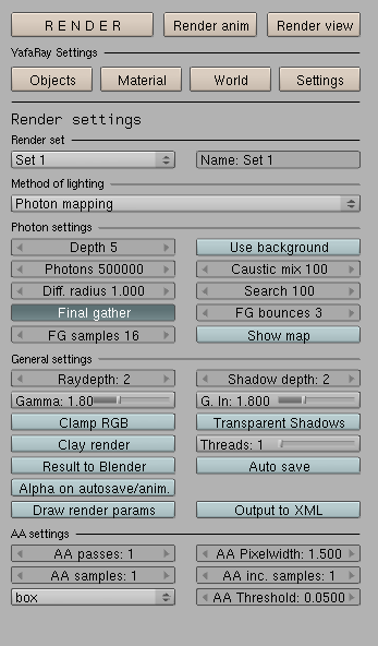 Screenshot of YafaRay Exporter.